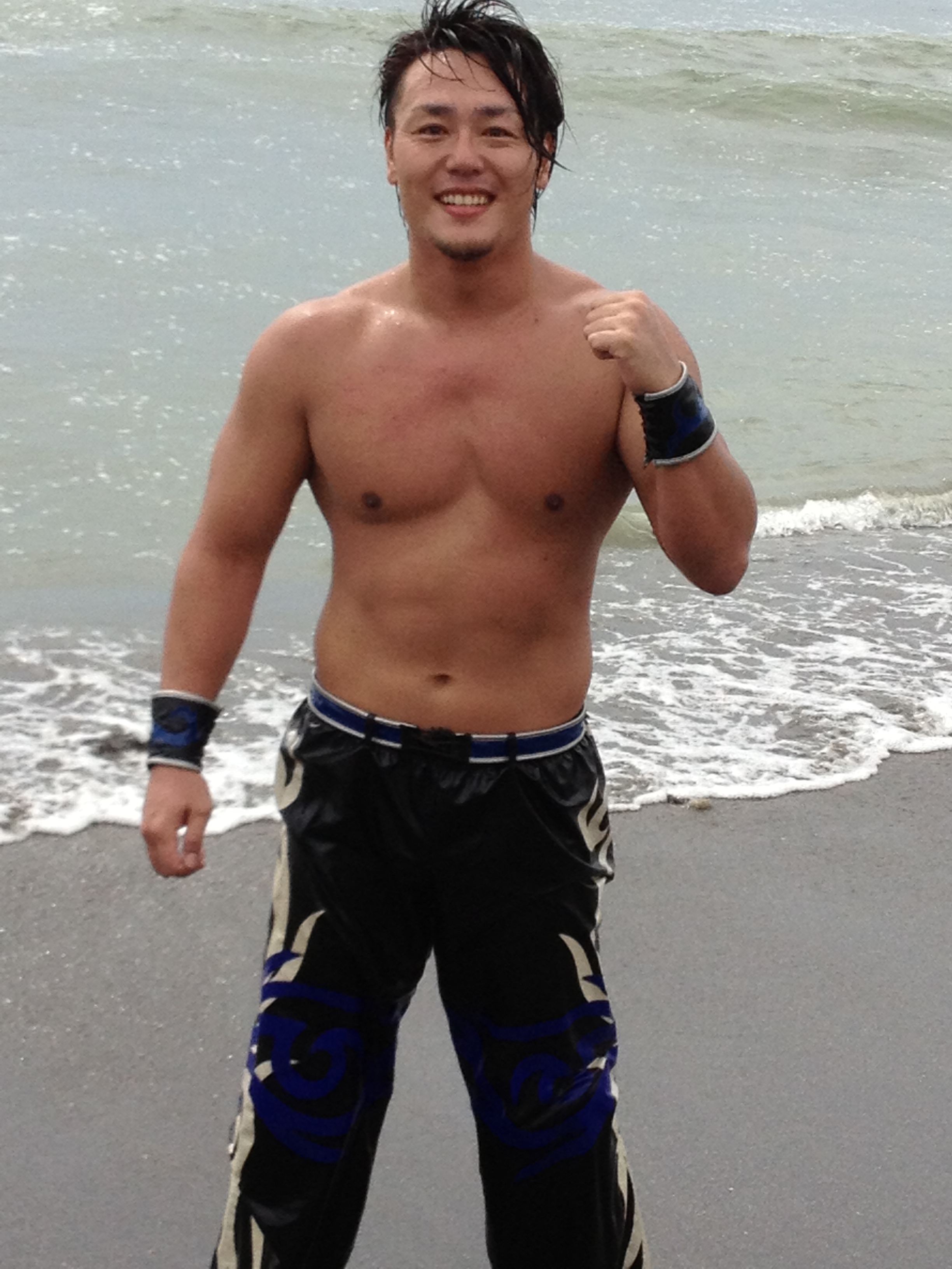 2,013年海プロレスにて